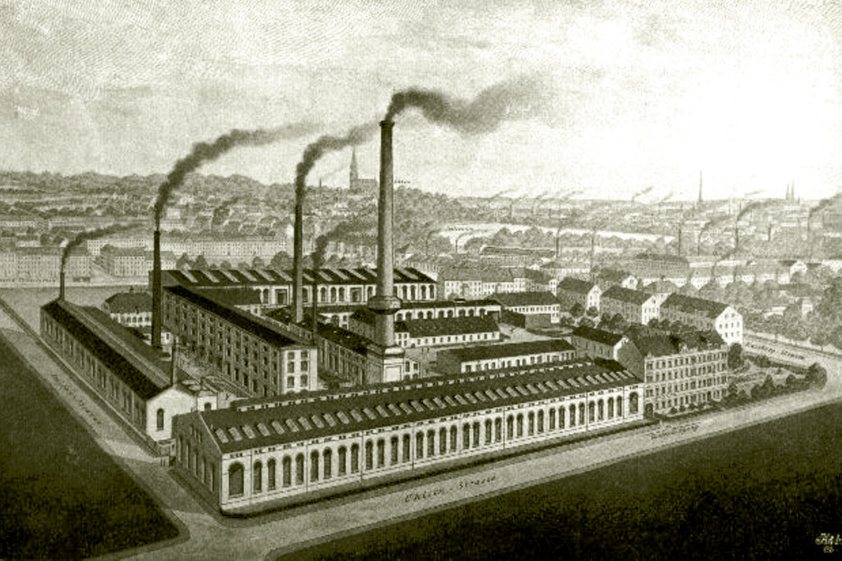 Hauboldwerk Chemnitz (später Erste Maschinenfabrik ERMAFA) zwischen Uhlich- (vorn) und Limbacherstraße (hinten), um 1890, wird heute (2017) als Einkaufszentrum genutzt